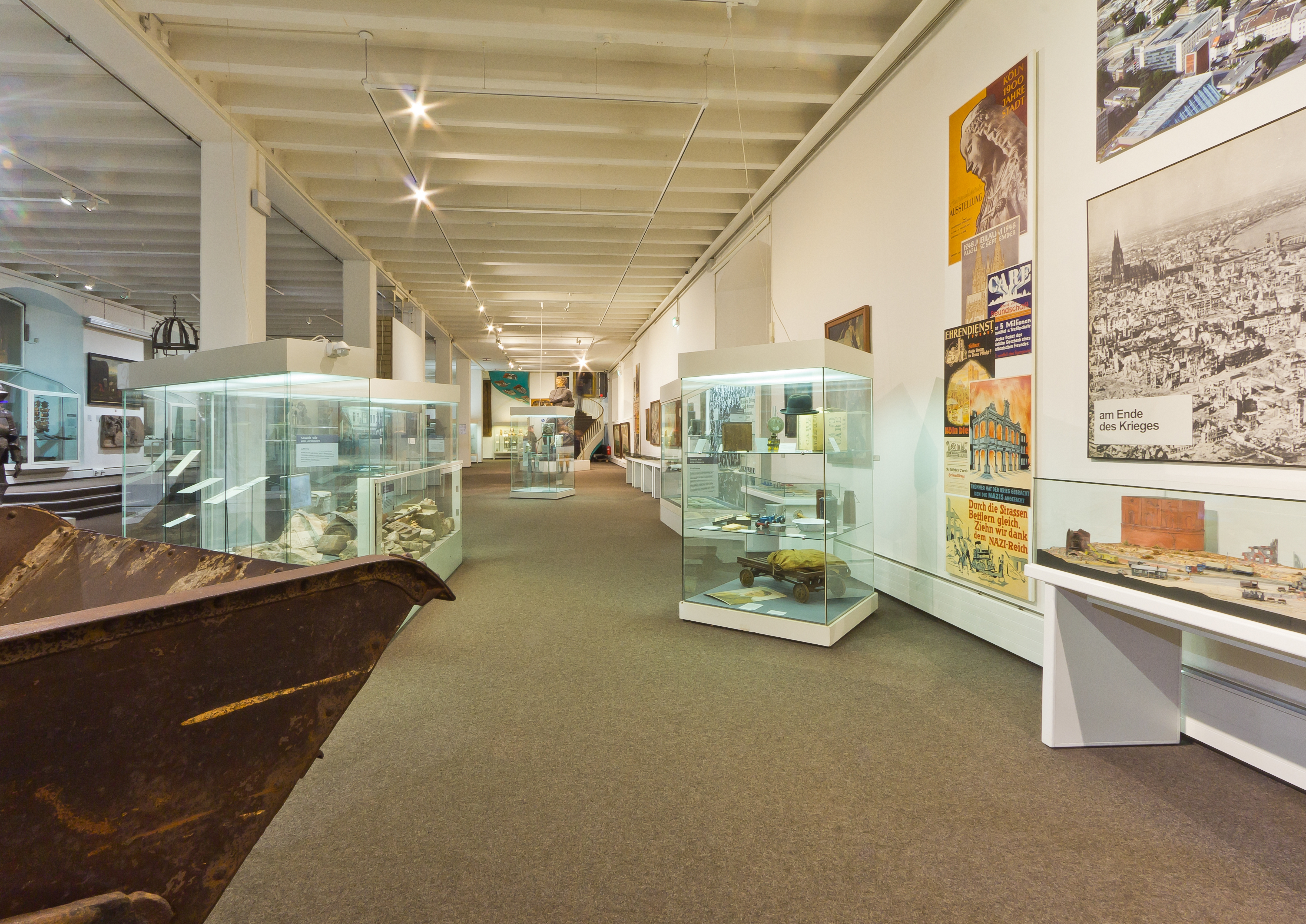 Kölnisches Stadtmuseum - Dauerausstellung Cologne’s Municipal Museum Native nameKölnisches StadtmuseumLocationCologneCoordinates50° 56′ 28.58″ N, 6° 57′ 00.6″ E Established1888Web pageKölnisches StadtmuseumAuthority control : Q881214 VIAF: 123987826 ISNI: 0000 0001 2106 4589 LCCN: n50047754 GND: 2015828-2 SUDOC: 167192442 WorldCat institution QS:P195,Q881214